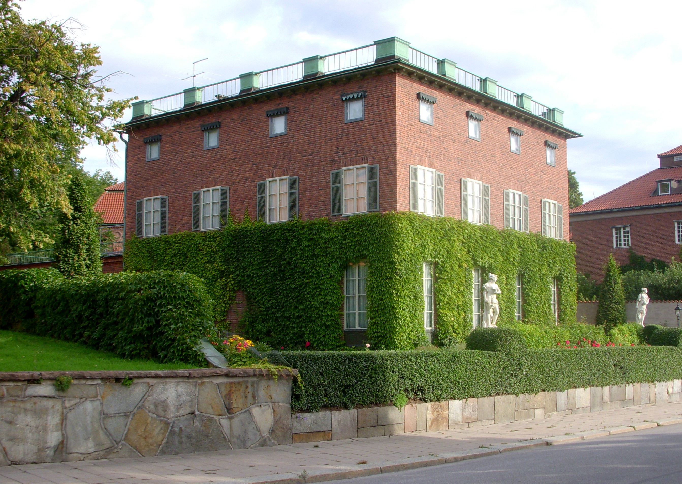 Diplomatstaden i Stockholm, Kv. Ambassadören nr. 3, "Villa Bonnier"